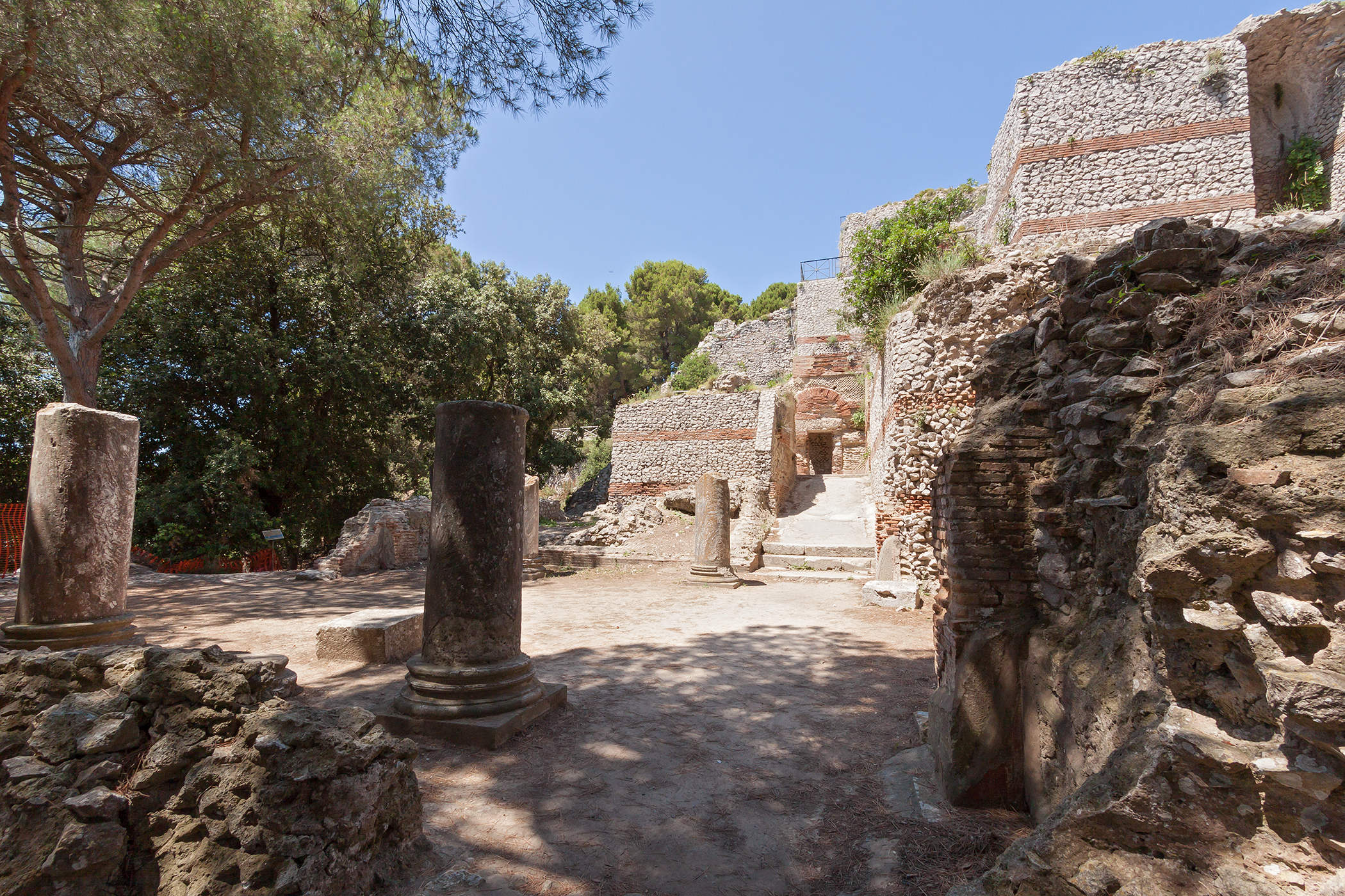 Руины Виллы Юпитера